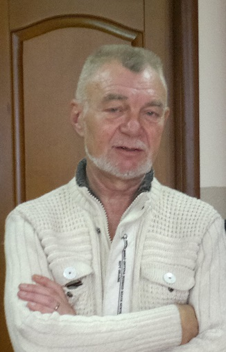 Академик А. С. Чирков